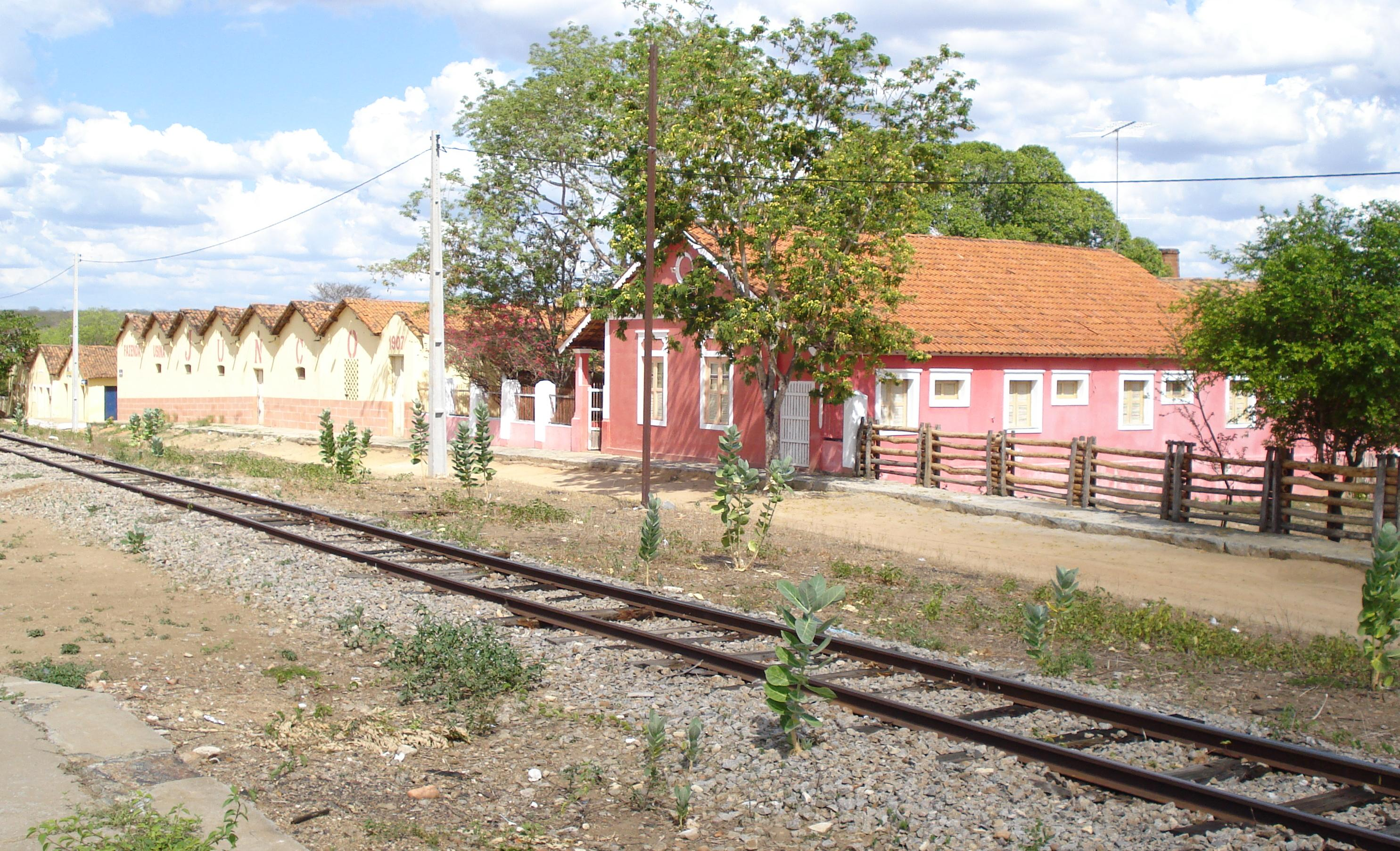 Vista parcial da sede do distrito de Daniel de Queiroz, Quixadá, Ceará, Brasil.